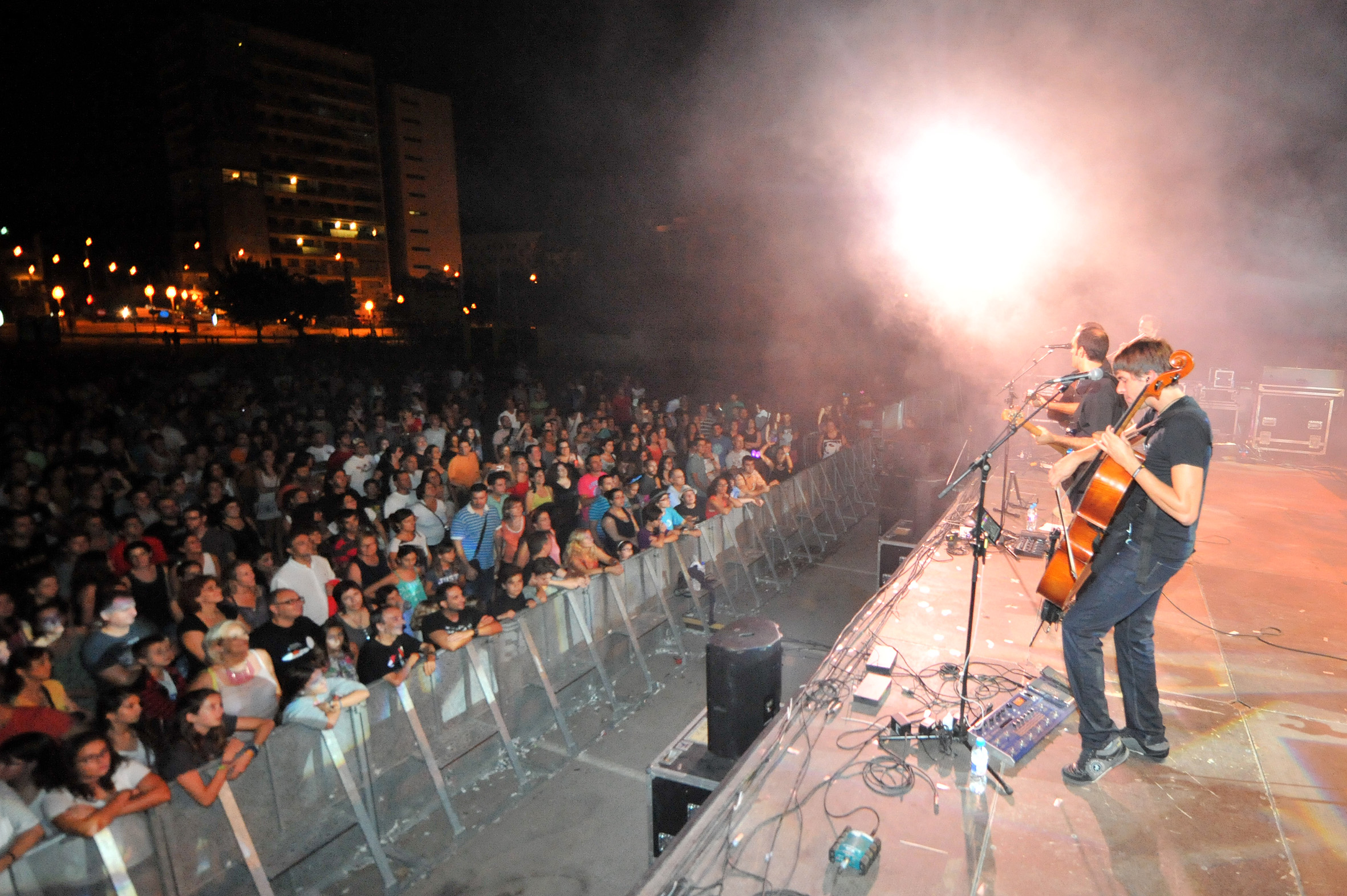 Concert de Blaumut a Esplugues de Llobregat, 20 de setembre 2014.